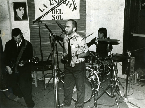 Patricio Rey y sus Redonditos de Ricota durante una actuación en los años 70